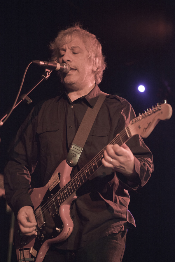 Foto: Rosario López